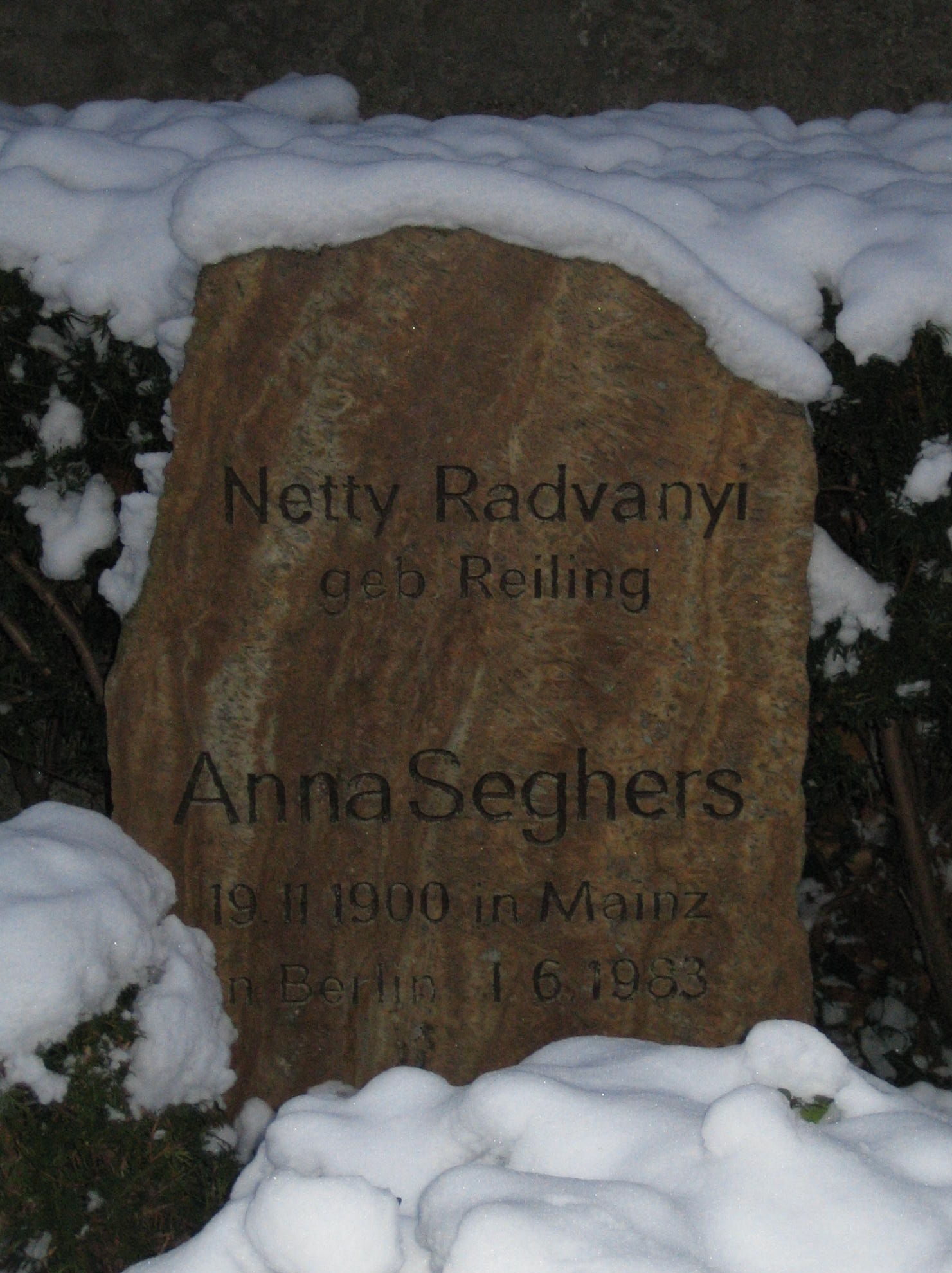 Grave of Anna Seghers a. k. a. Netty Radvanyi, Dorotheenstädtischer Friedhof, Berlin. Germany.